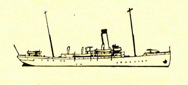 {da} Inspektionsskibet Islands Falk. Søsat 1906. {en} Danish Gunboat Islands Falk (1906).